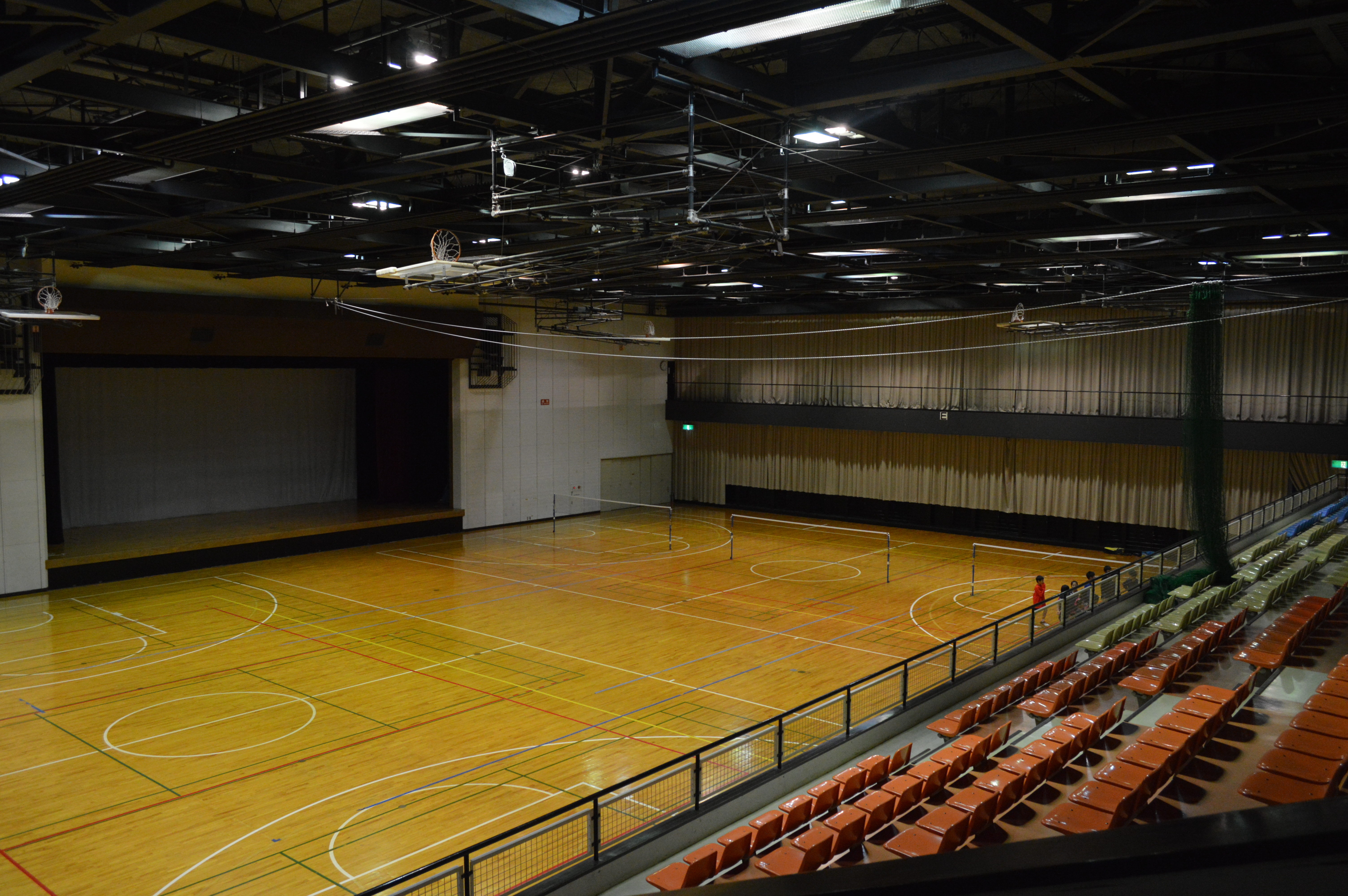 愛知県田原市 田原市総合体育館。田原市中央図書館（田原市図書館）、田原文化会館と敷地を共有。